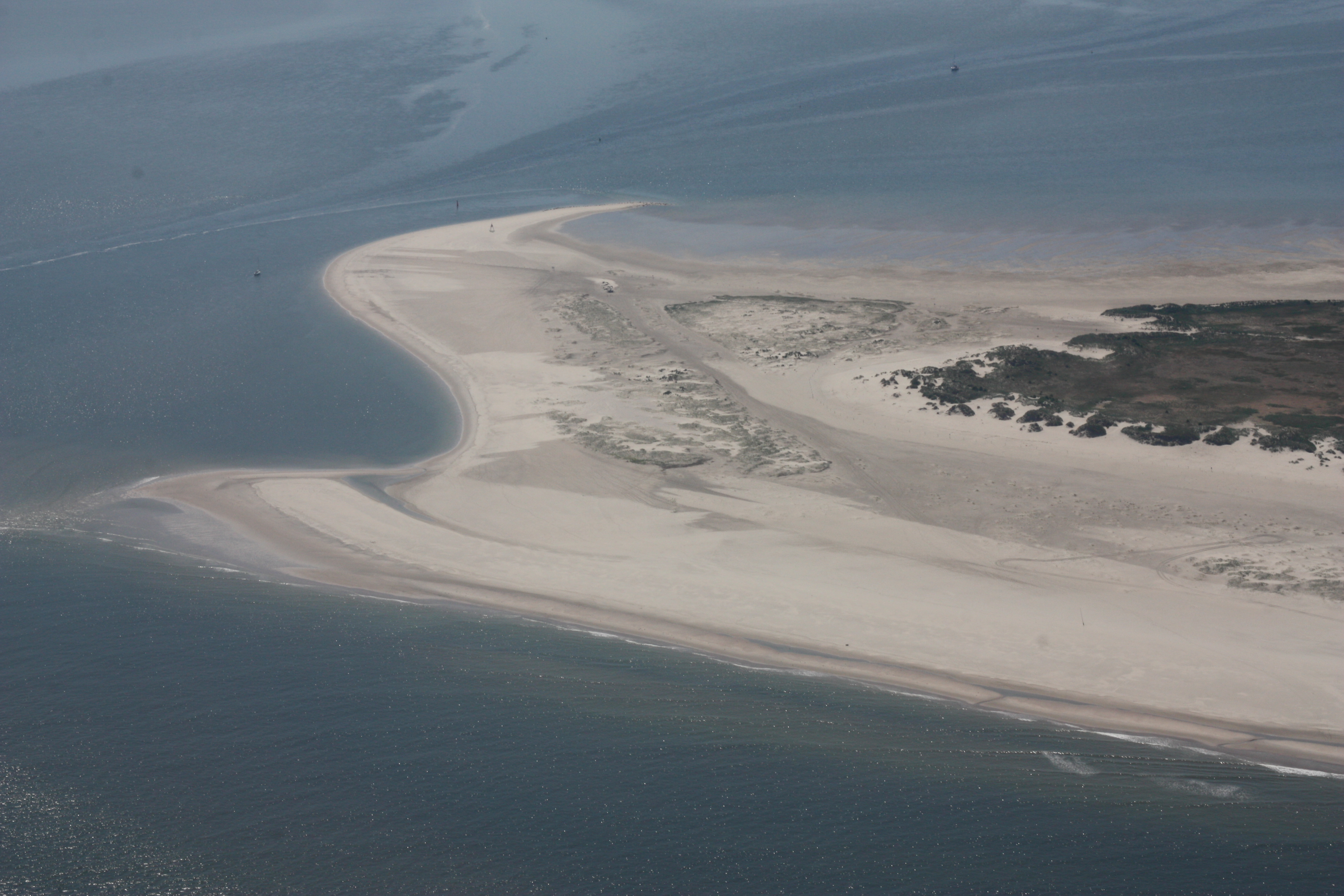 Flug über Norderney - von WEsten kommend, am Nordstran entlang; Flughöhe 500 m = 1500 ft; Juli 2010